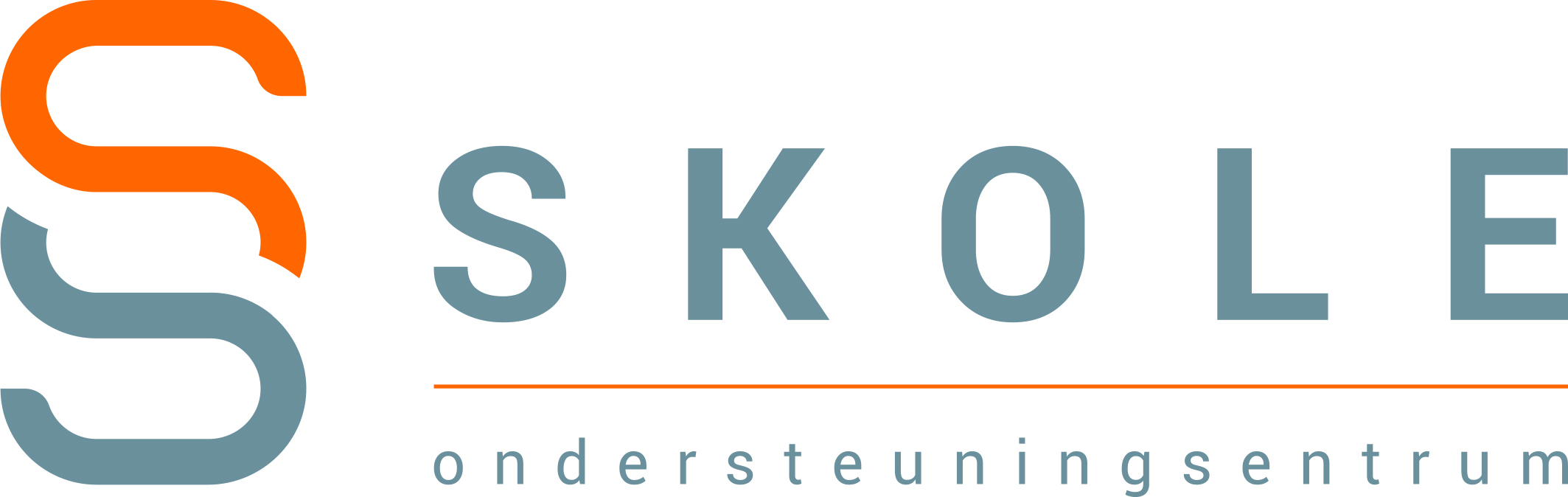 Skoleondersteuningsentrum se handelsmerk